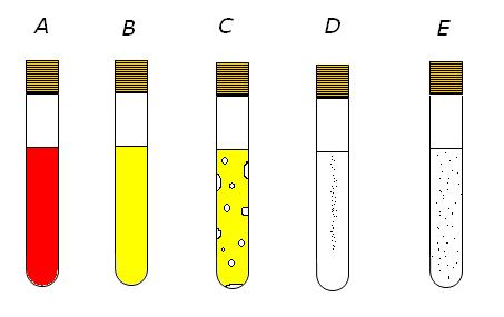 crée le 12/07/06